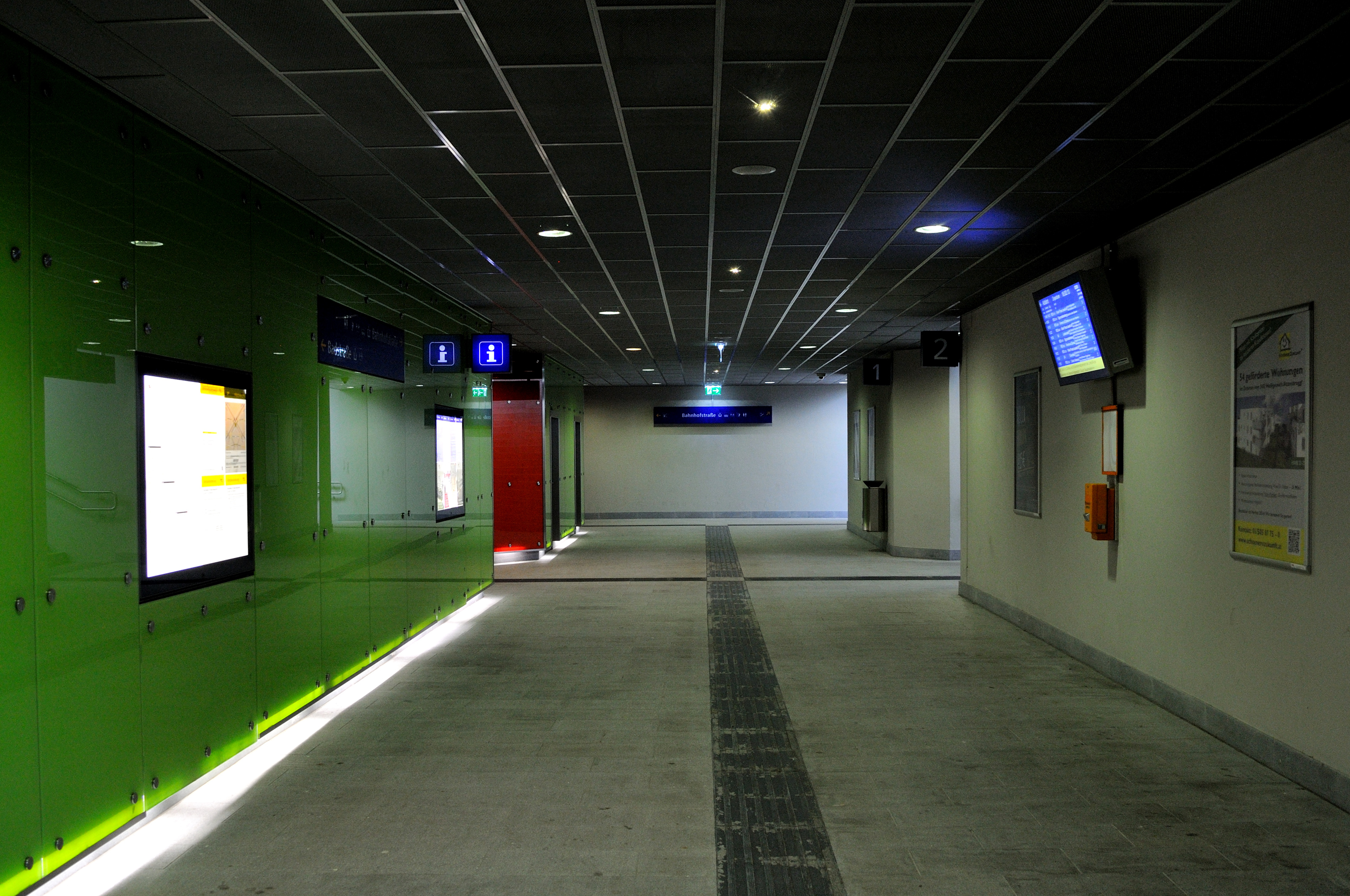 Unterführung am Bahnhof Absdorf-Hippersdorf